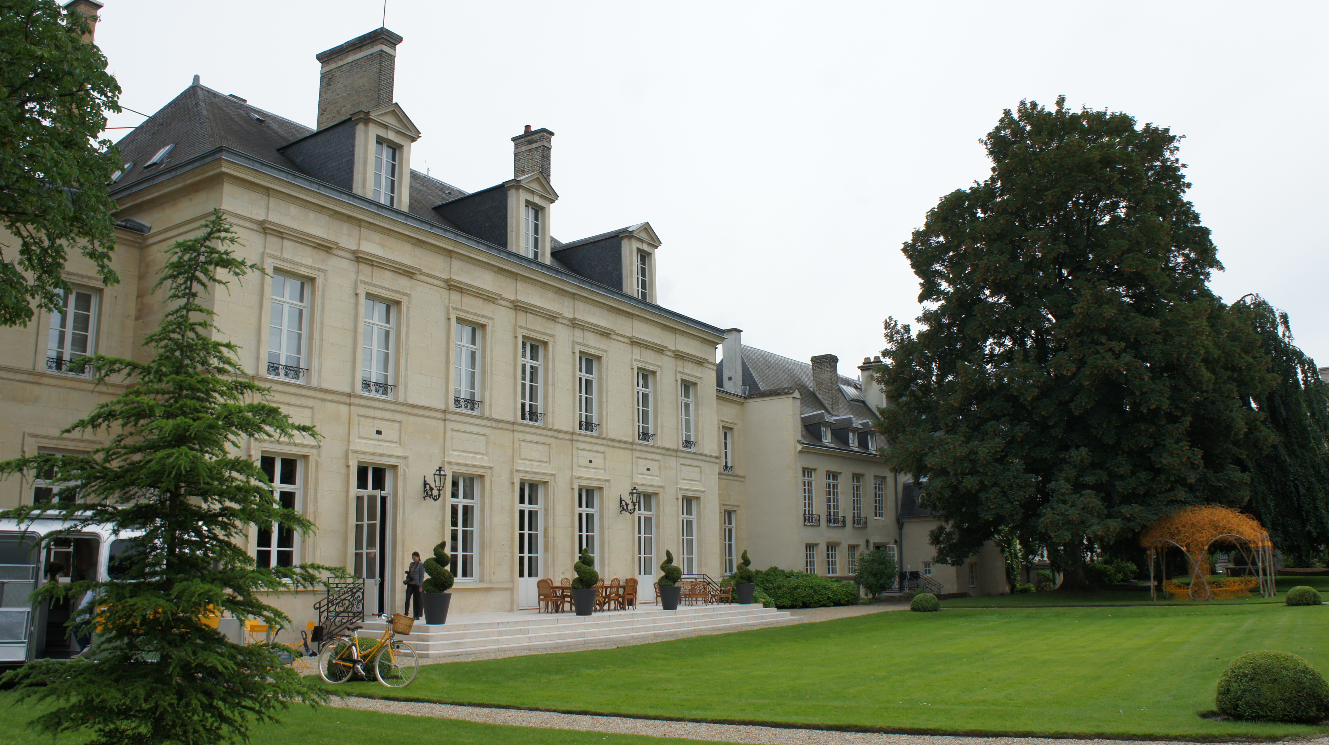 Journées particulières se tenant hôtel du Marc, vue de la façade nord donnant sur jardin .